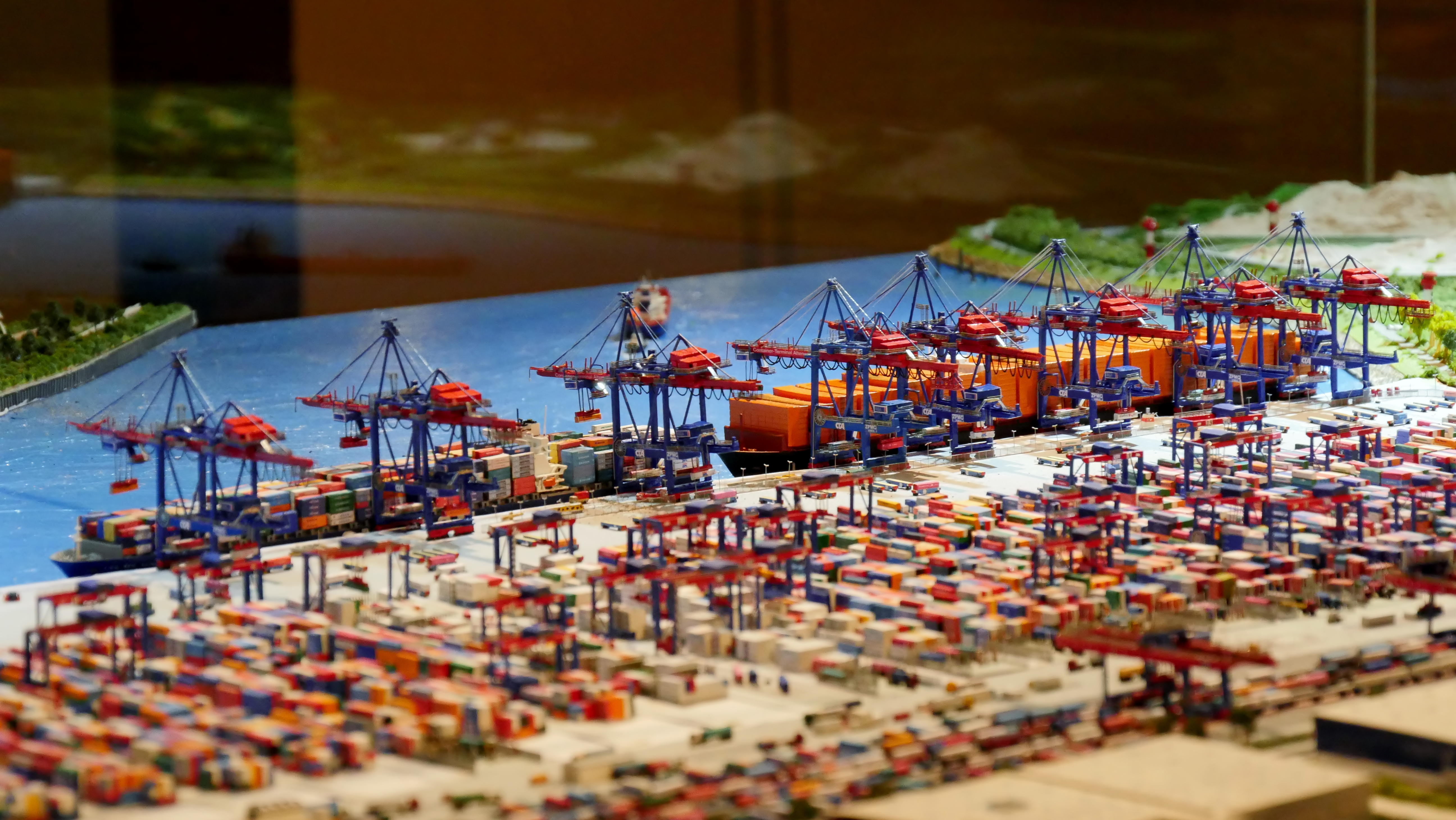 Modell des Hamburger Hafens im Maßstab 1:1250 im Internationales Maritimes Museum Hamburg